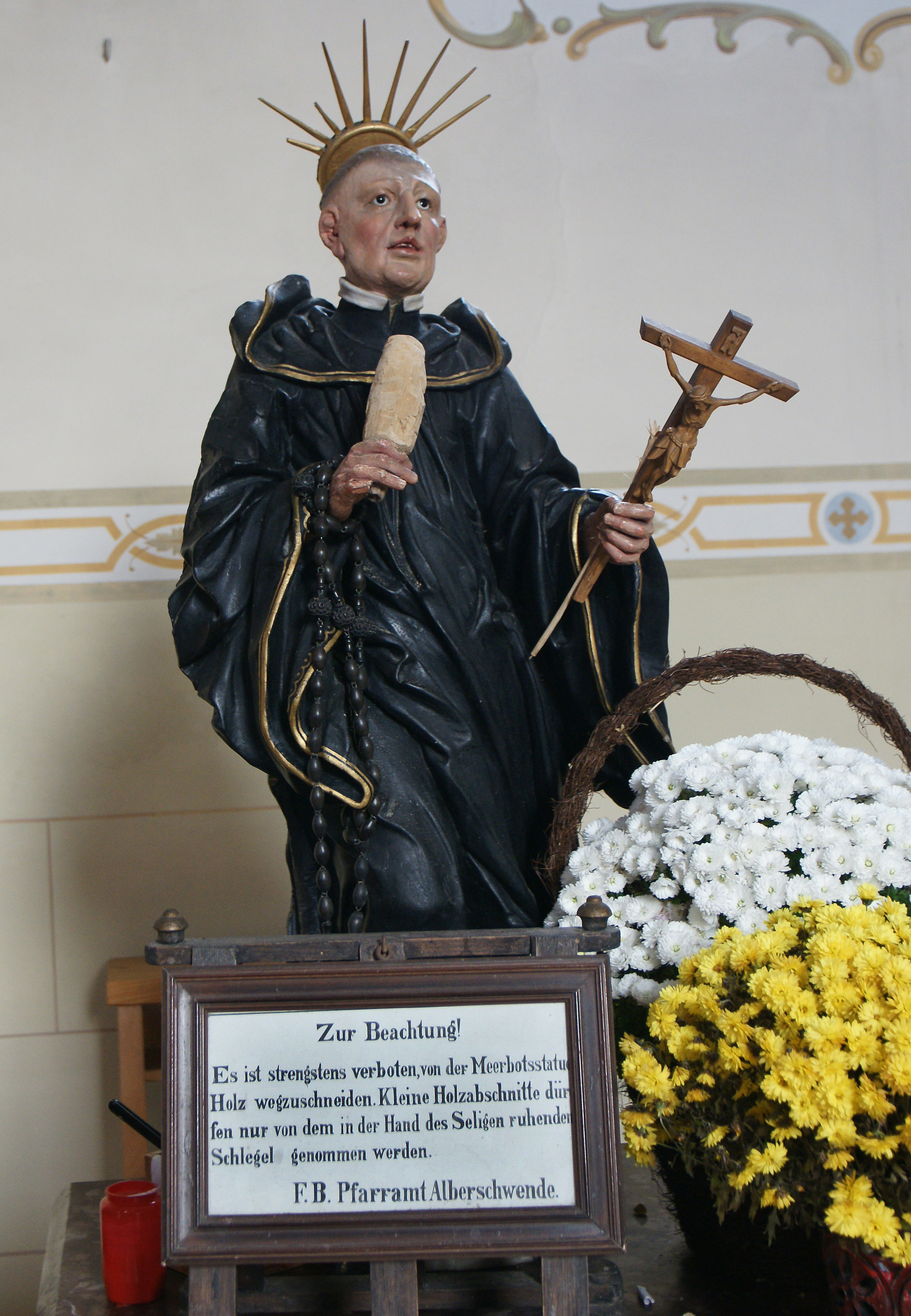 Kirche hl. Wendelin in Alberschwende im Bregenzerwald. Holzfigur des seligen Merbod.